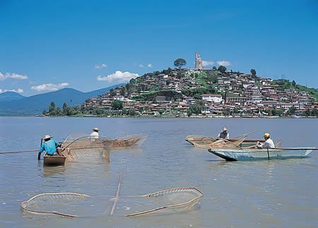 Michoacan, Lago de Patzcuaro